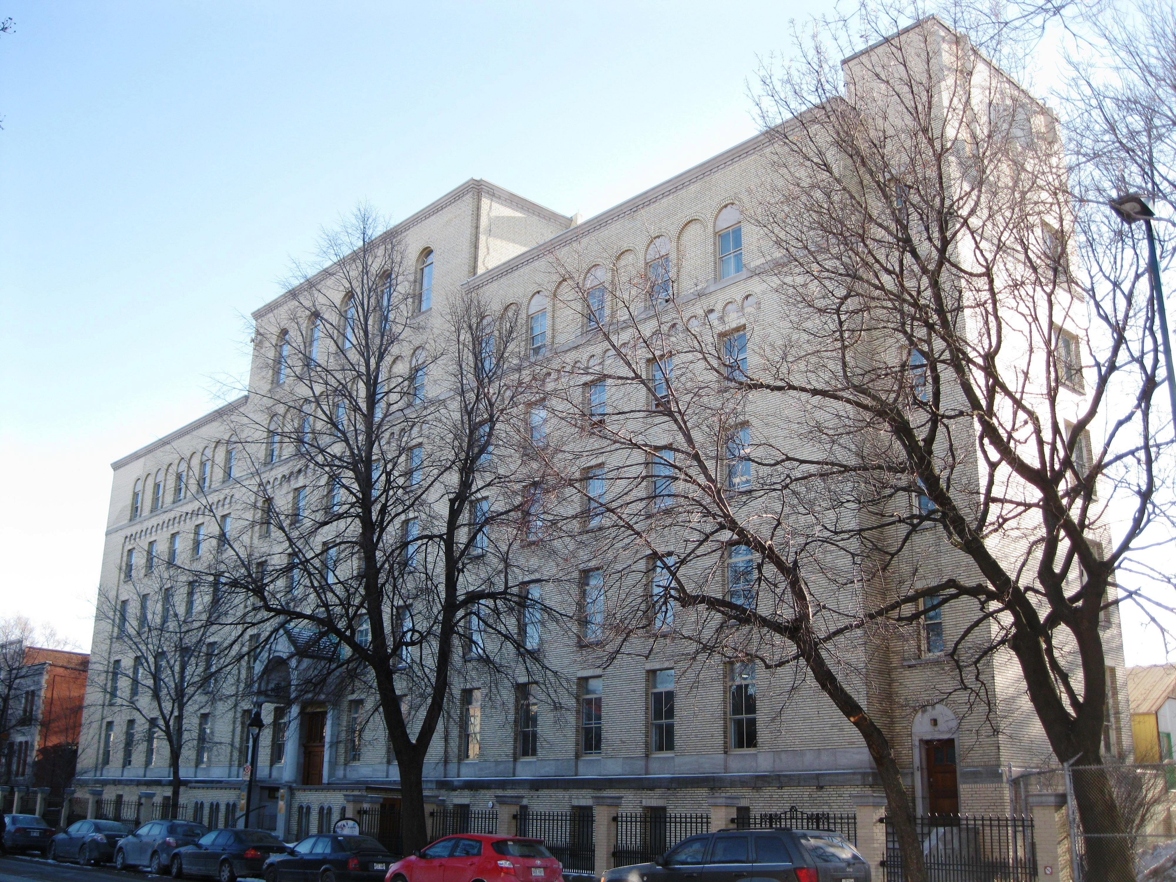 Ancien monastère des Pères du Saint-Sacrement, 4450, rue Saint-Hubert, Montréal. Il est utilisé depuis le 8 novembre 1999 par des organismes locataires du Centre de services communautaires du Monastère.